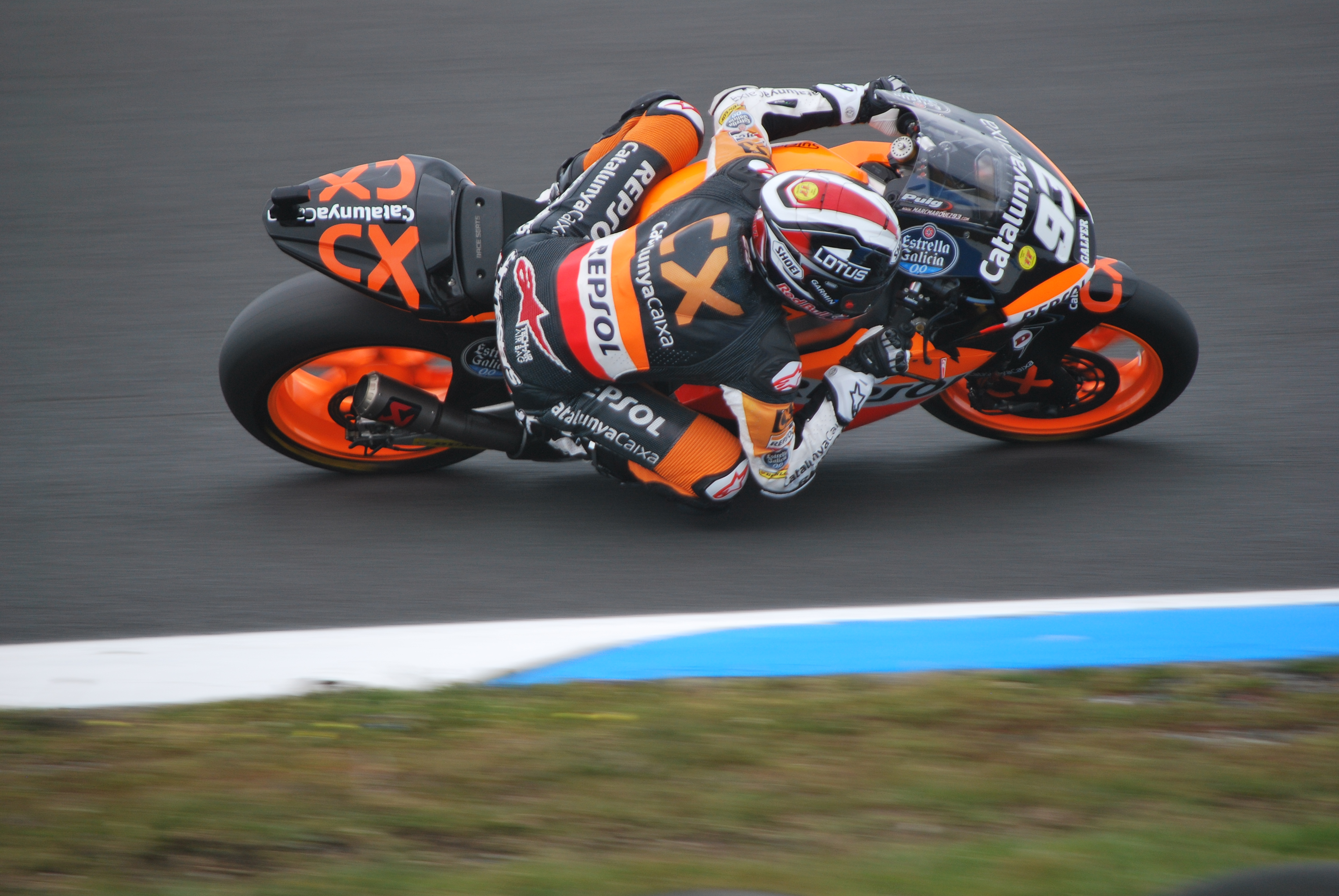 Marc Marquez Moto2 2012